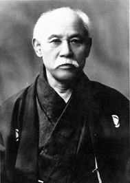 中村不折（慶応2年－昭和18年）